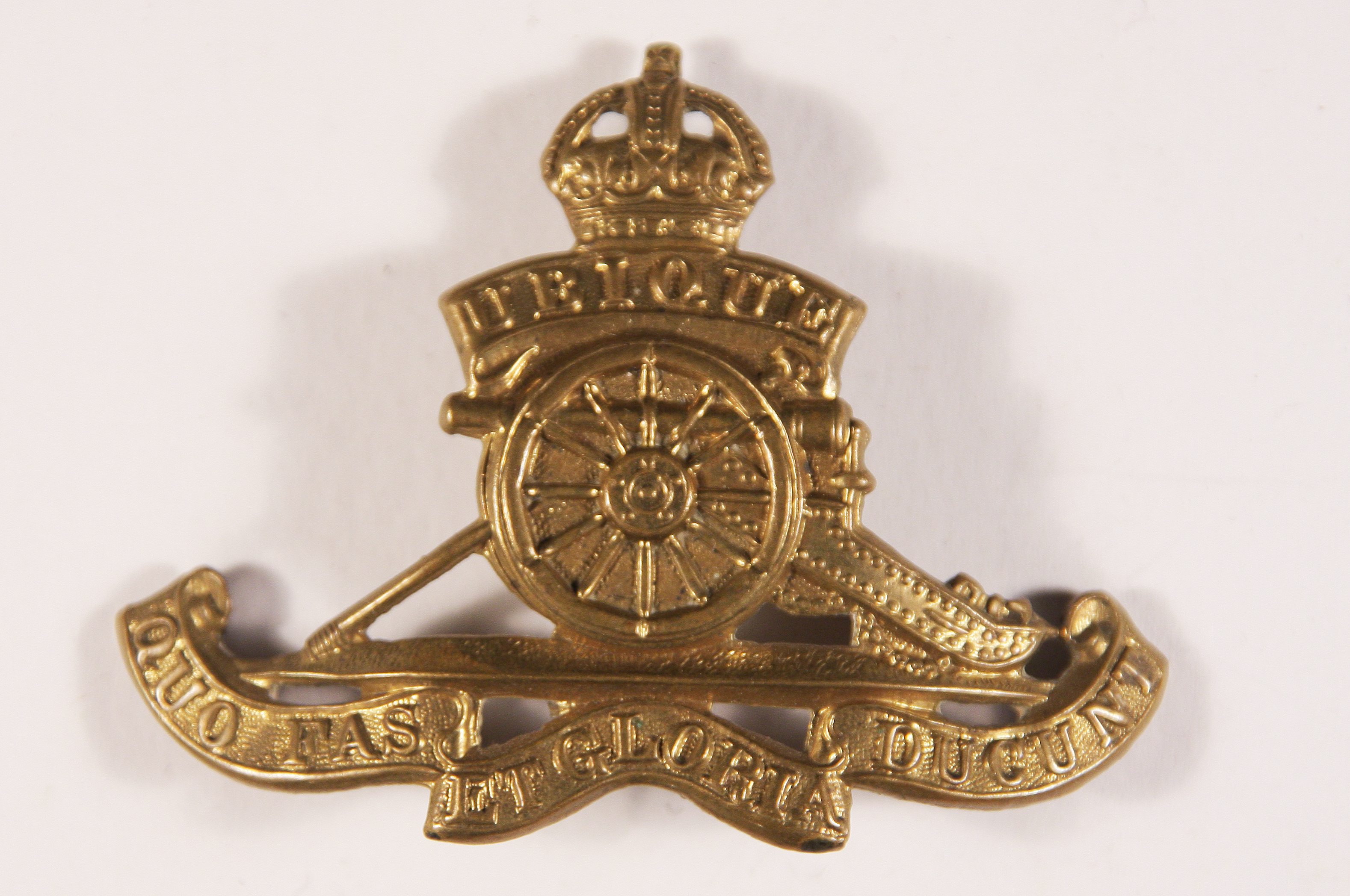 Gravur: "Ubique Quo Fas et Gloria Ducunt" ("Überall wohin Recht und Ruhm führen").